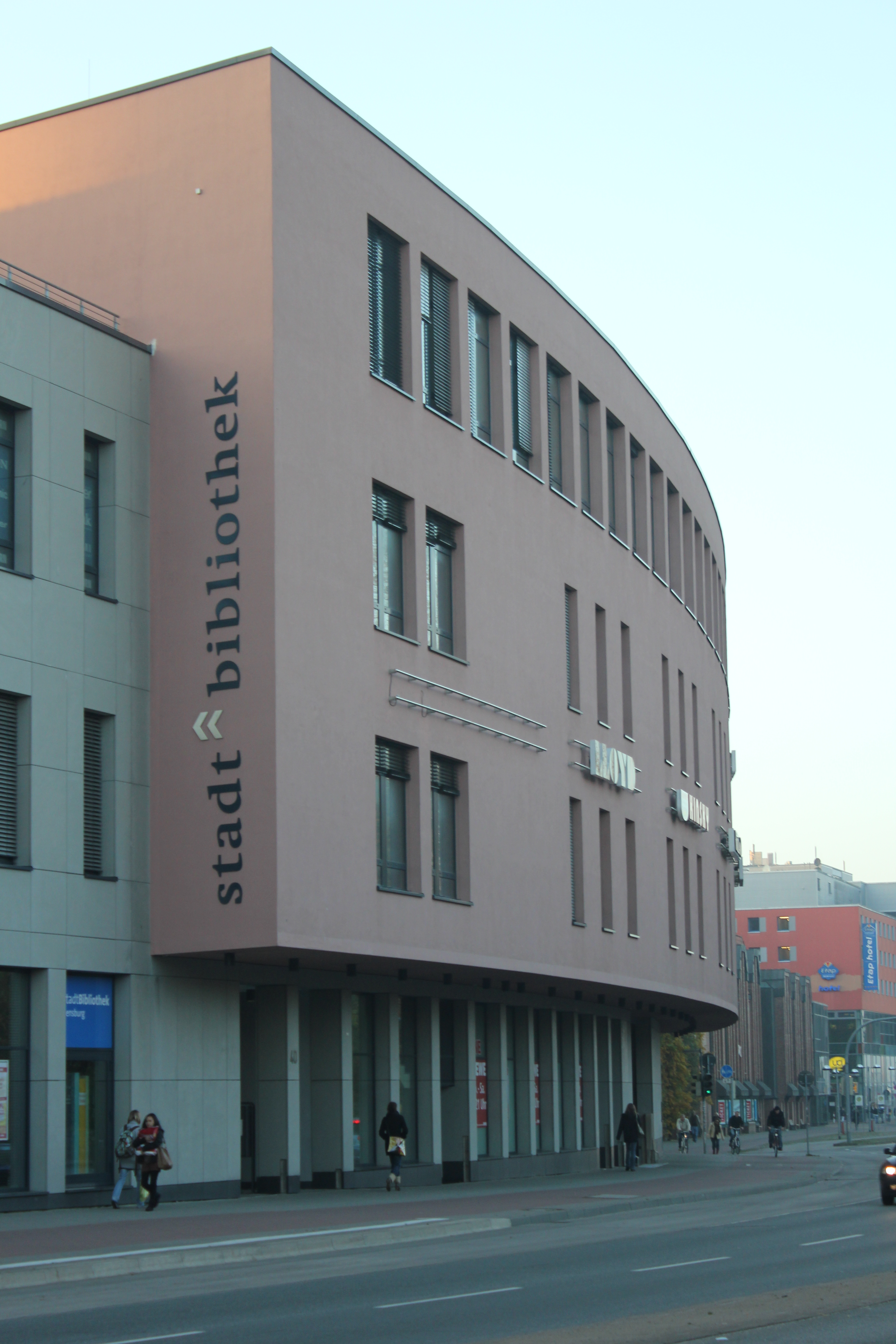 Stadtbibliothek Flensburg im Gebäude der Flensburg Galerie (oberstes Stockwerk)